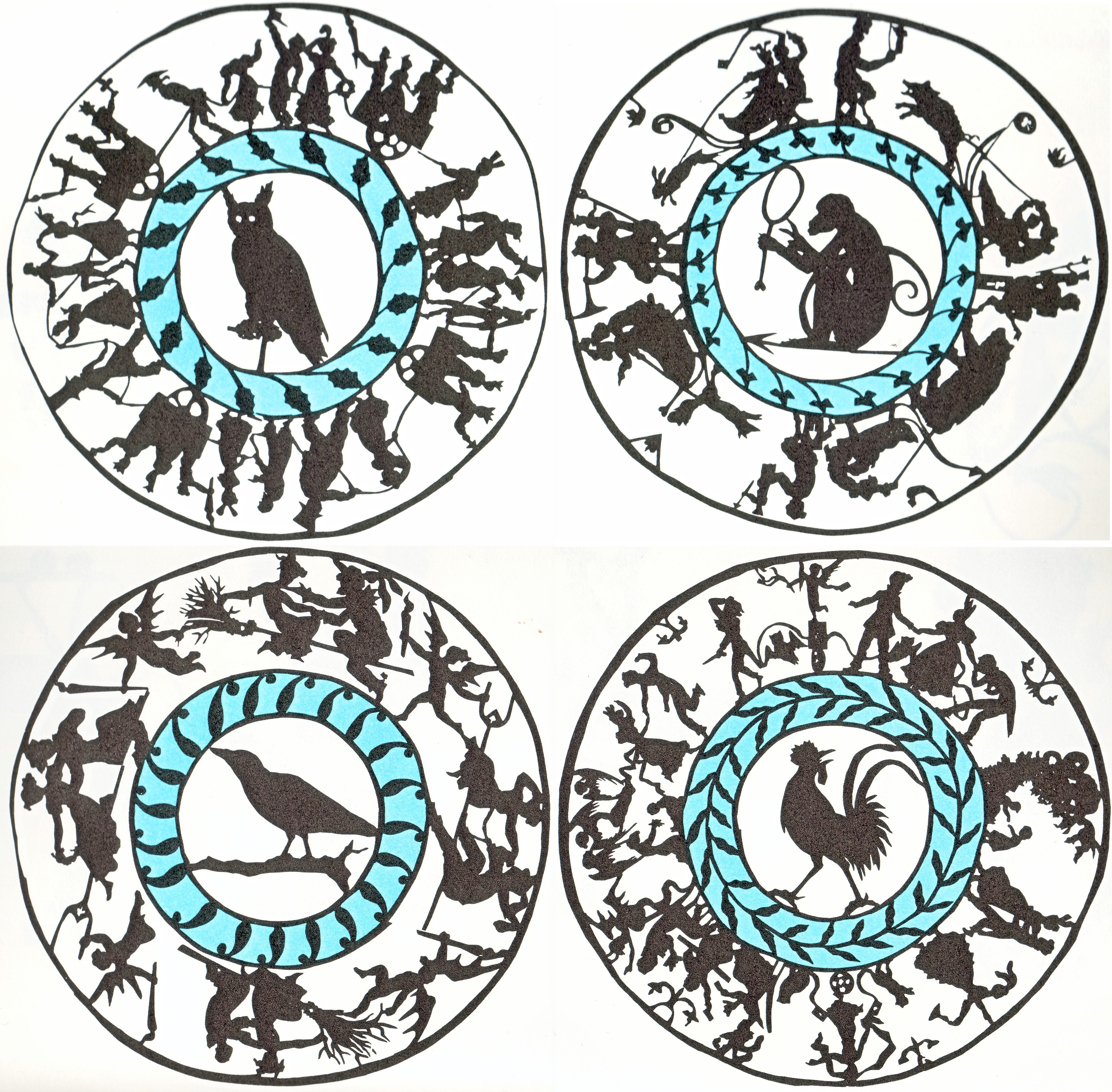 Luise Duttenhofer: Vier Spielteller, schwarzer Scherenschnitt, teilweise mit hellblauem Papier unterlegt, Durchmesser ca. 10 cm, Entstehungsjahr unbekannt. Die Schnitte zeigen Tiermedaillons, die durch einen Blattkranz von dem umlaufenden Bildfries getrennt sind. Die Tiermedaillons zeigen von links nach rechts: eine Eule auf einer Aufsitzstange, einen Affen mit einem Spiegel, einen Raben auf einem Ast und einen federspreizenden Hahn. Auf den äußeren Bildfriesen sind je vier zusammenhängende Szenen dargestellt: Umzug (Eulenteller), Schlittenfahrten (Affenteller), Hexenritte (Rabenteller) und Gesellschaftspiele (Hahnenteller).